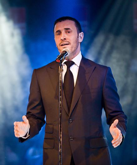 Kathem Al Saher is an Iraqi singer.